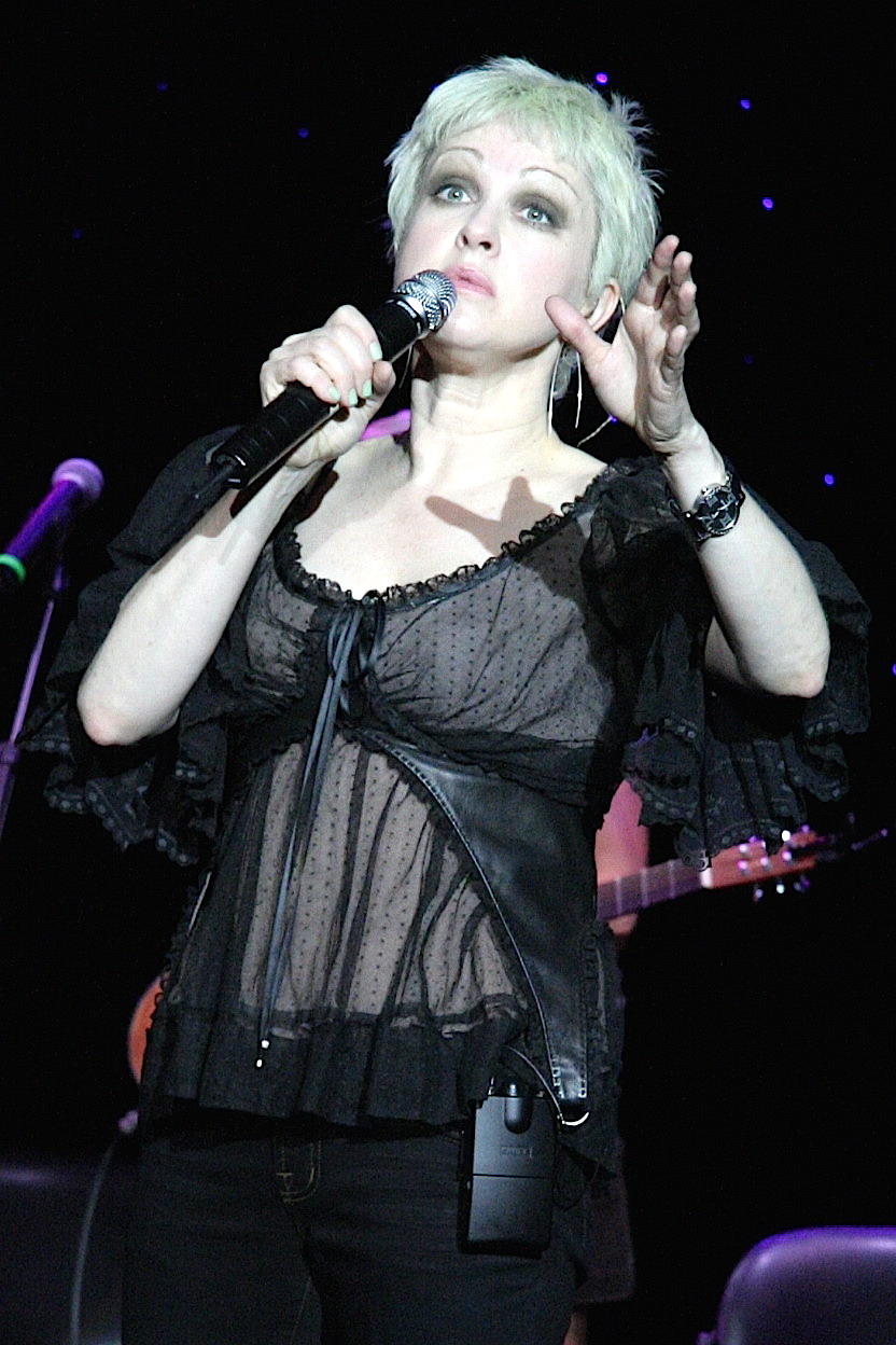 Alaska